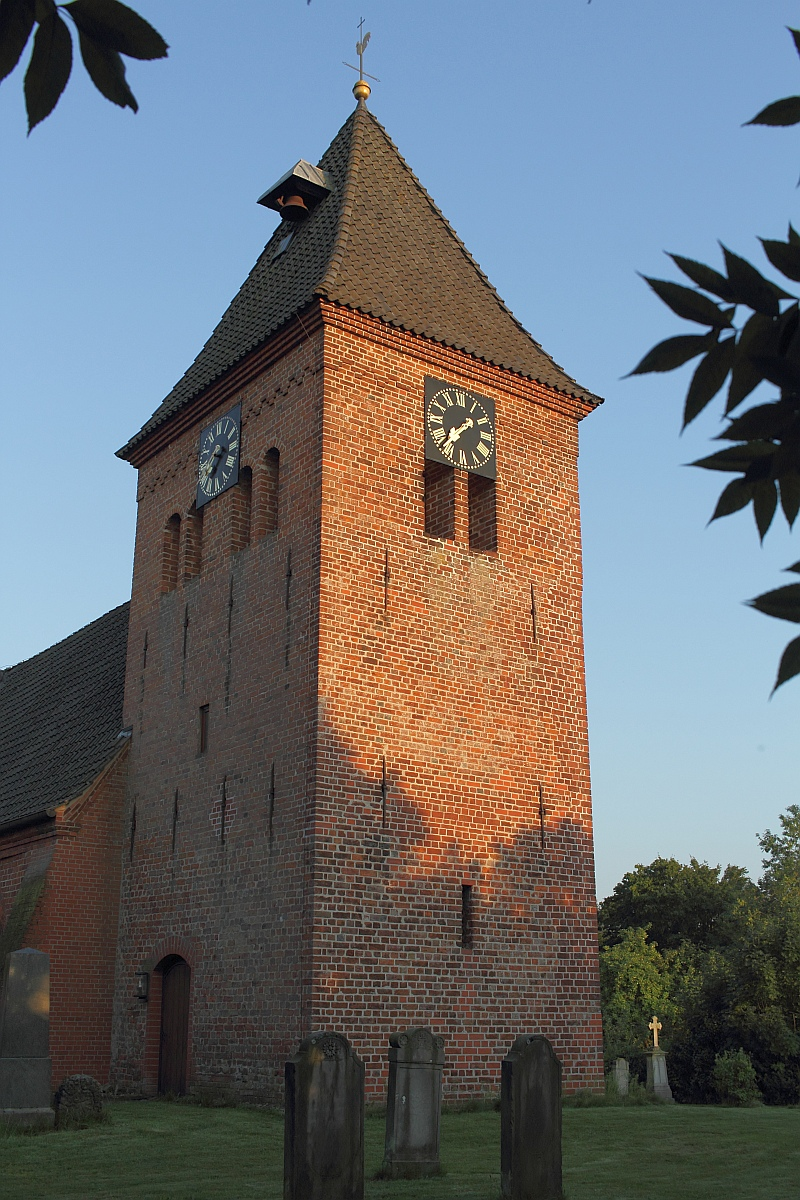 Kirchturm von St. Sigismund in Daverden (Gemeinde Langwedel, Landkreis Verden).